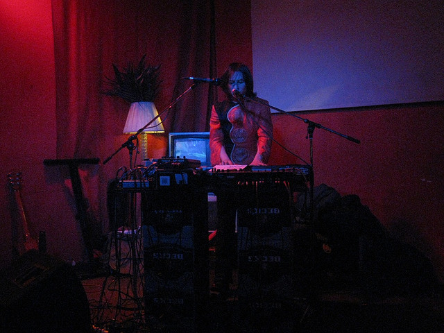 Monotekktoni at King Kong Klub Berlin